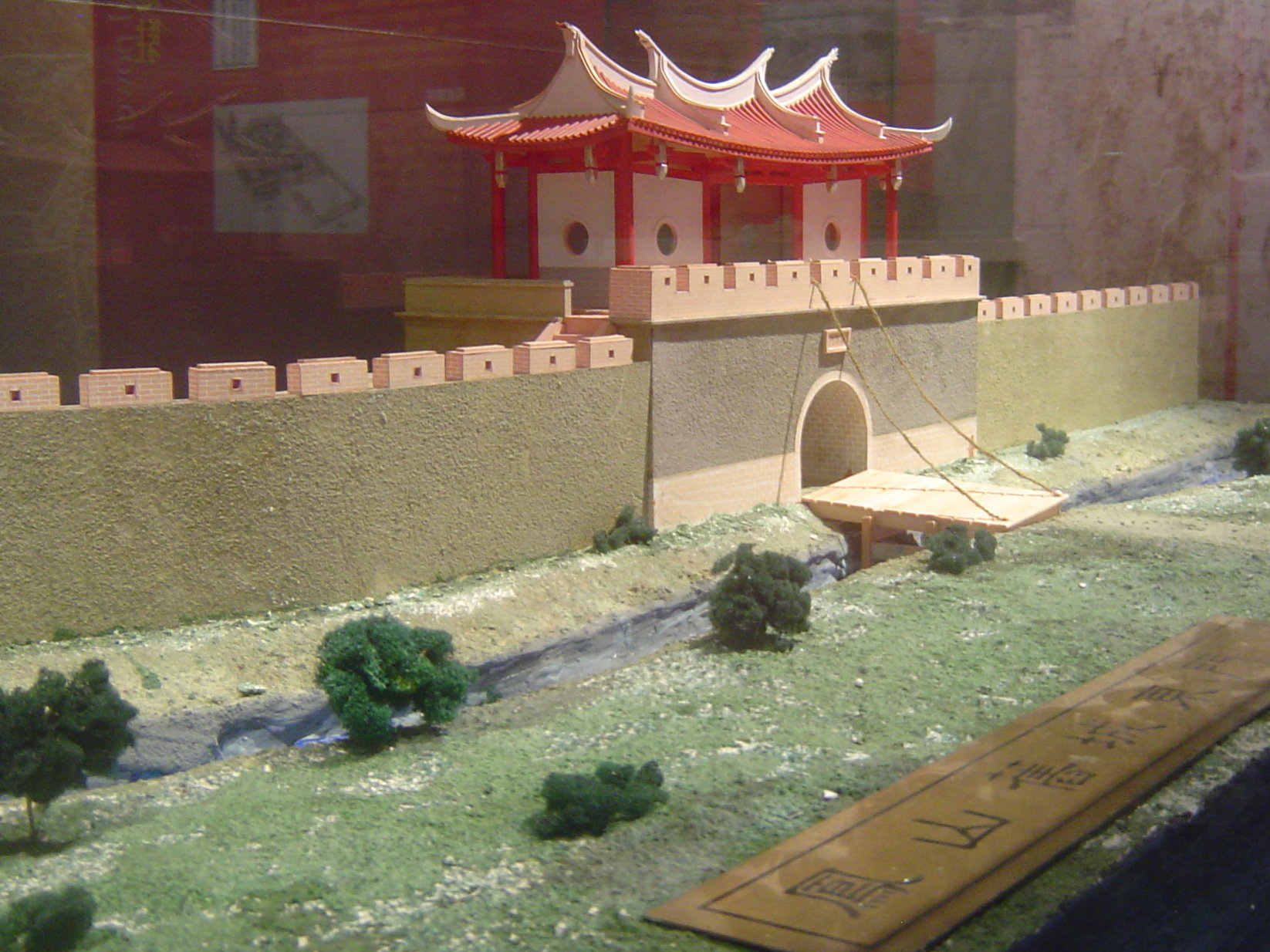 高雄市左營區鳳山縣舊城東門模型。